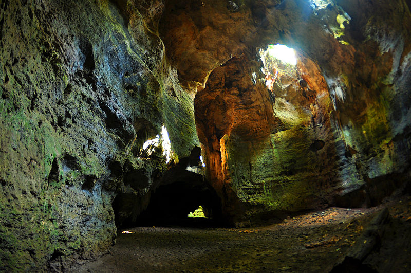 Gua Terawang, Blora, Jawa Tengah Indonesia